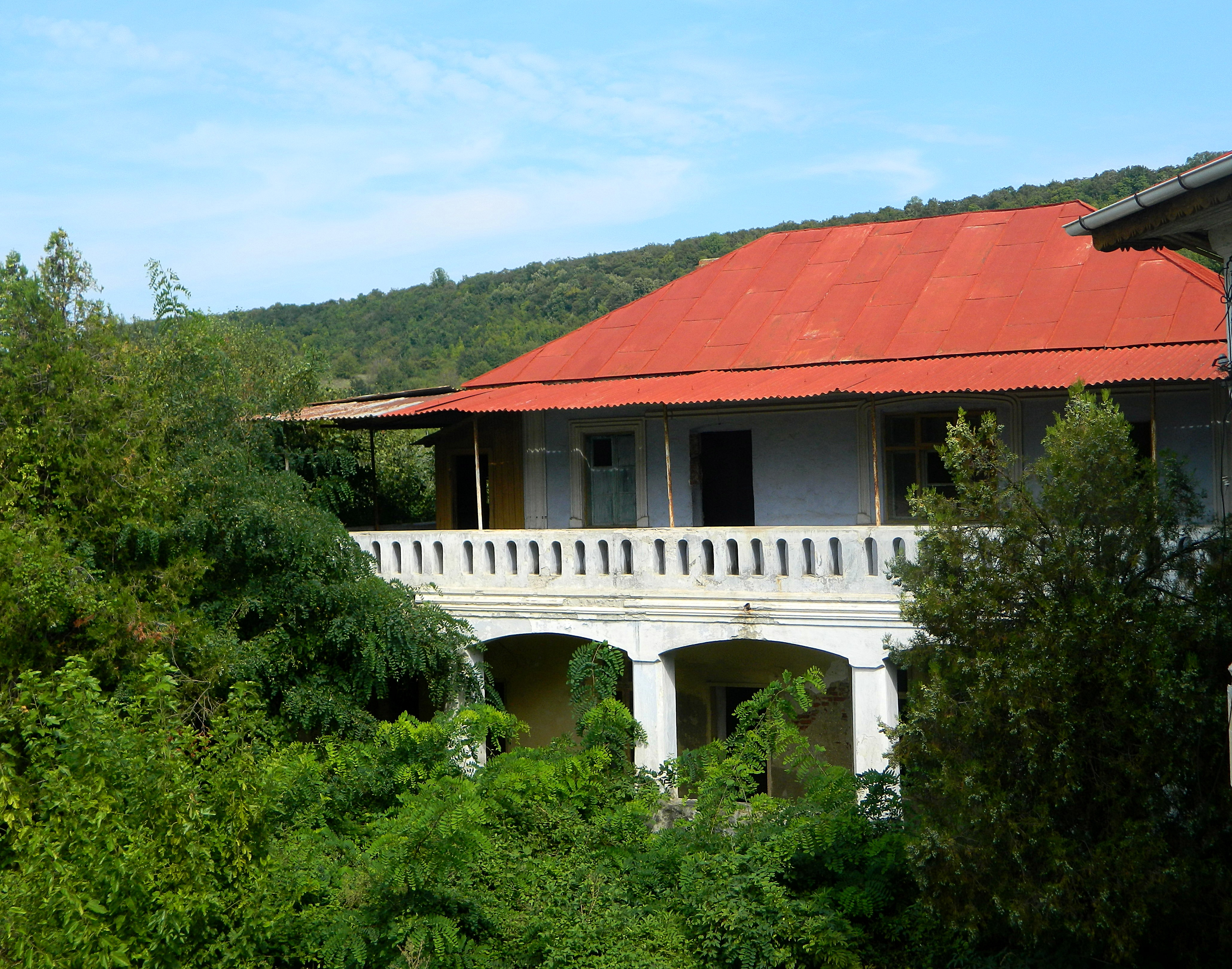 Anexe 03